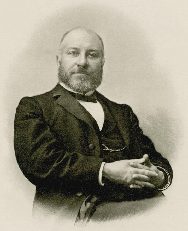 héliogravure